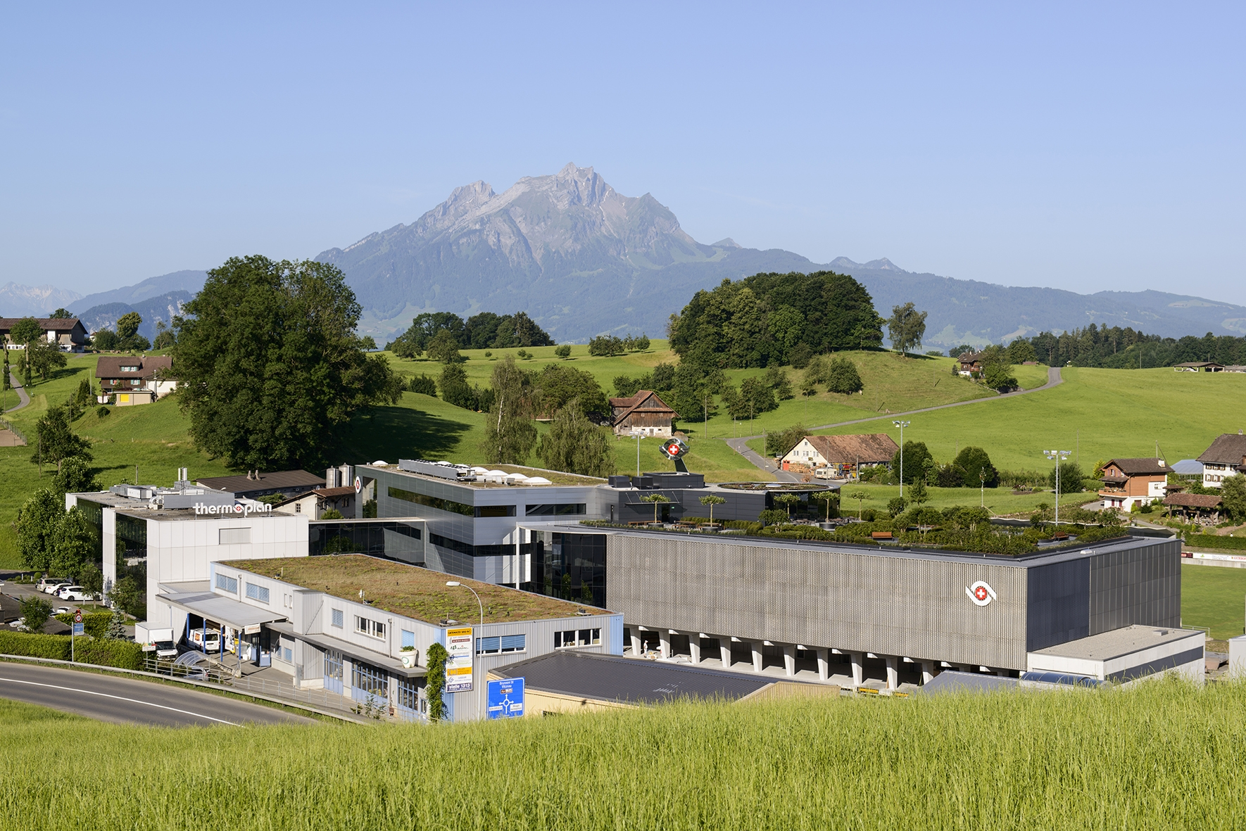 Werksgekände der Themoplan AG in Weggis